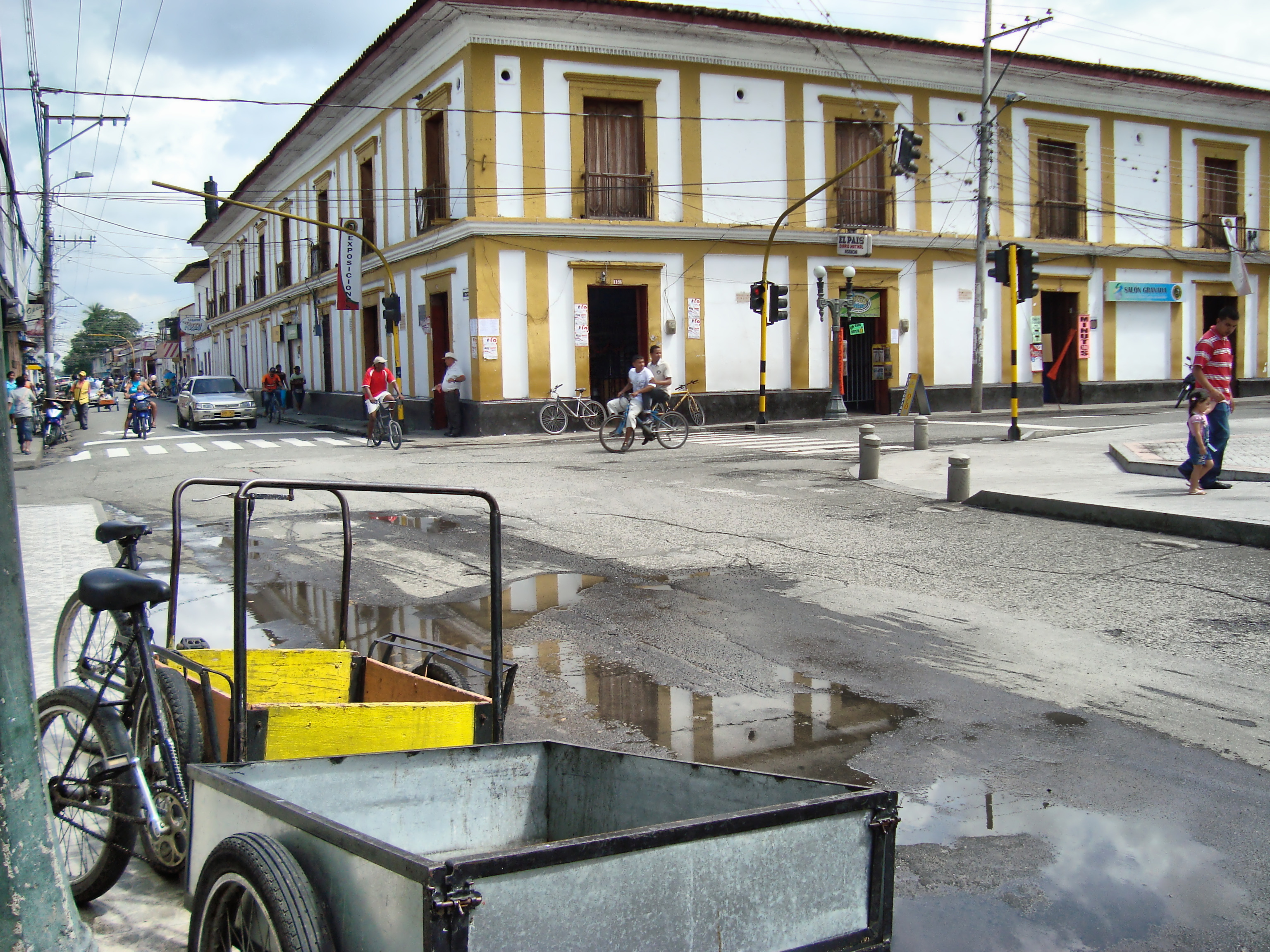 Panorama della Piazza Principale di El Cerrito, Valle del Cauca, Colombia